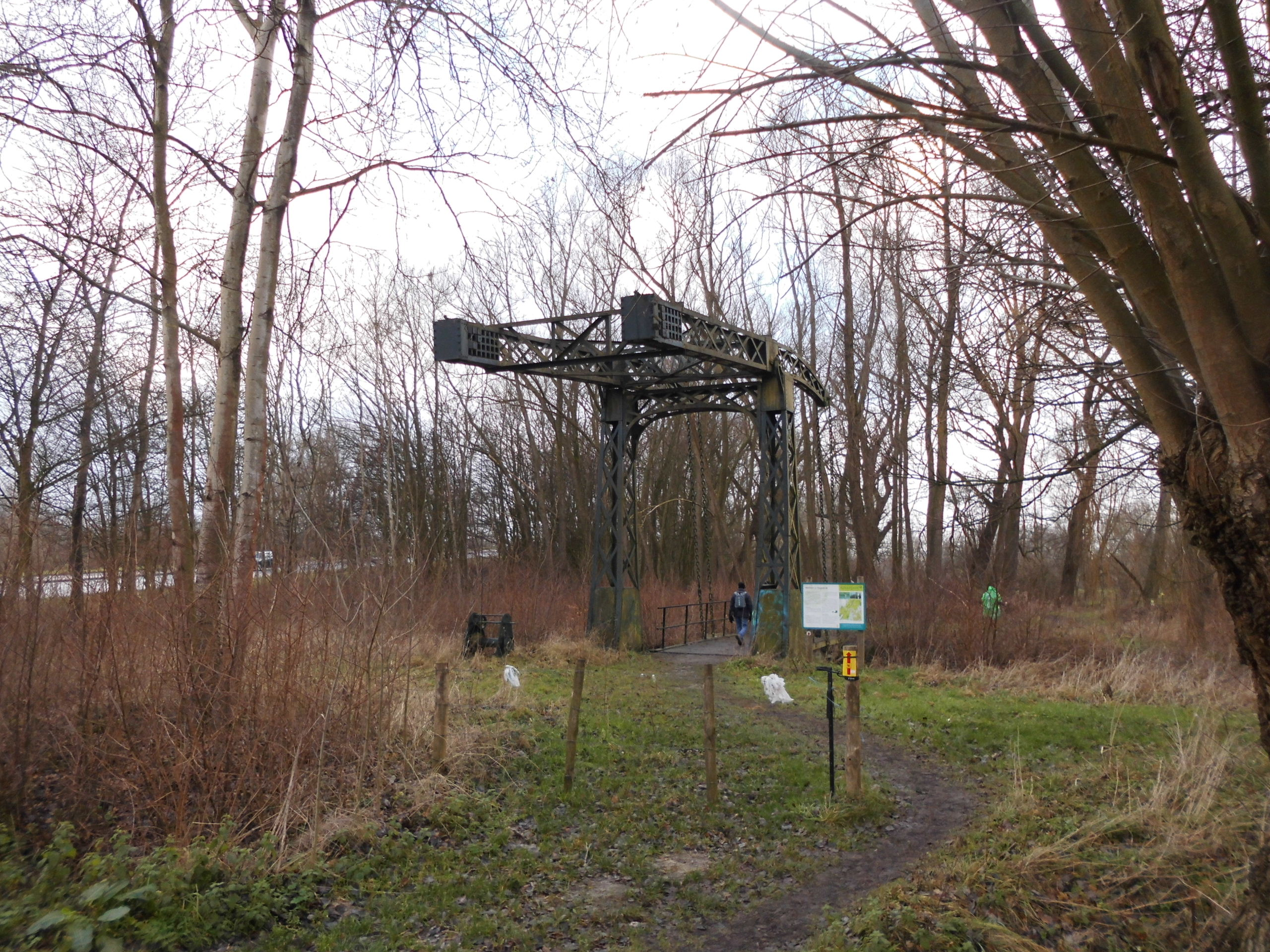 Deze ophaalbrug lag eerder over de Dender, maar werd in 1976 - als blijvende herinnering - verplaatst naar het natuurgebied Hogedonk. Gelegen nabij de nieuwe Denderbrug die Gijzegem verbindt met Wieze of in de Disgenaatdreef - Aalst - Oost-Vlaanderen - België